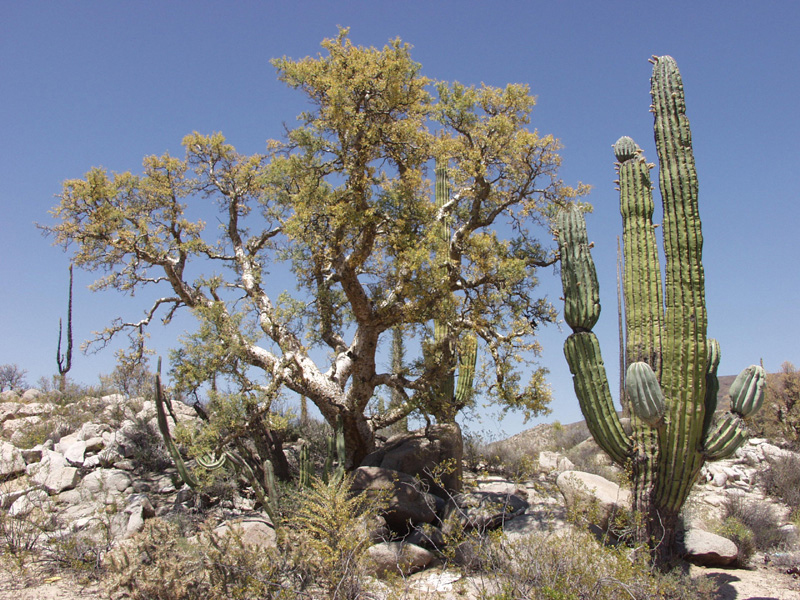 Pachycormus discolor, Elephant Tree, Copalquín, Torote blanco, photo taken at Baja California Desert, Cataviña region, Mexico